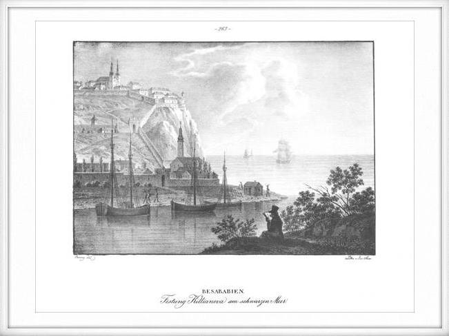 Кілійська фортеця: Кілійська фортеця